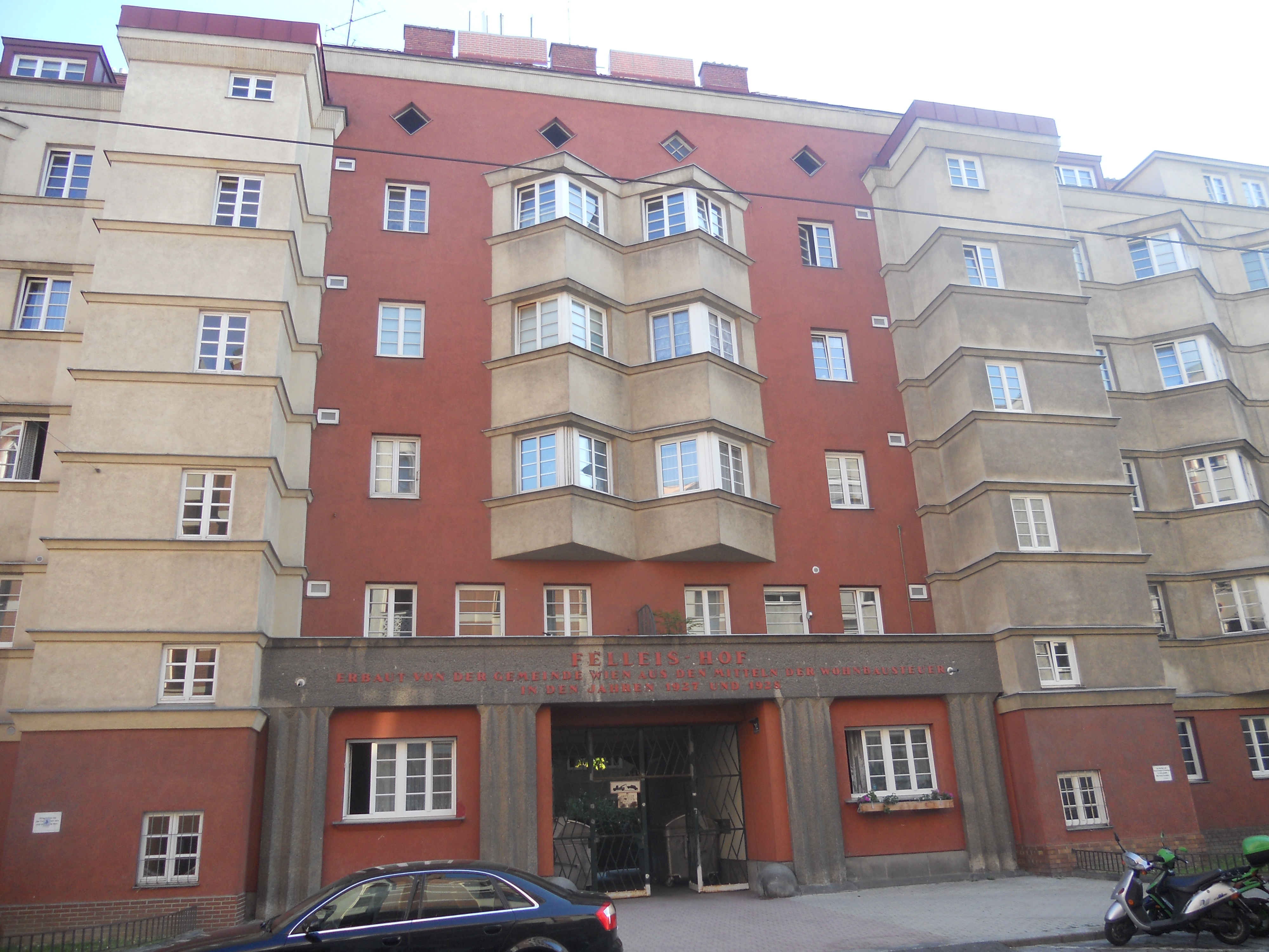 Der "Felleishof", ein Gemeindebau in der Hagenmüllergasse 32 in Wien